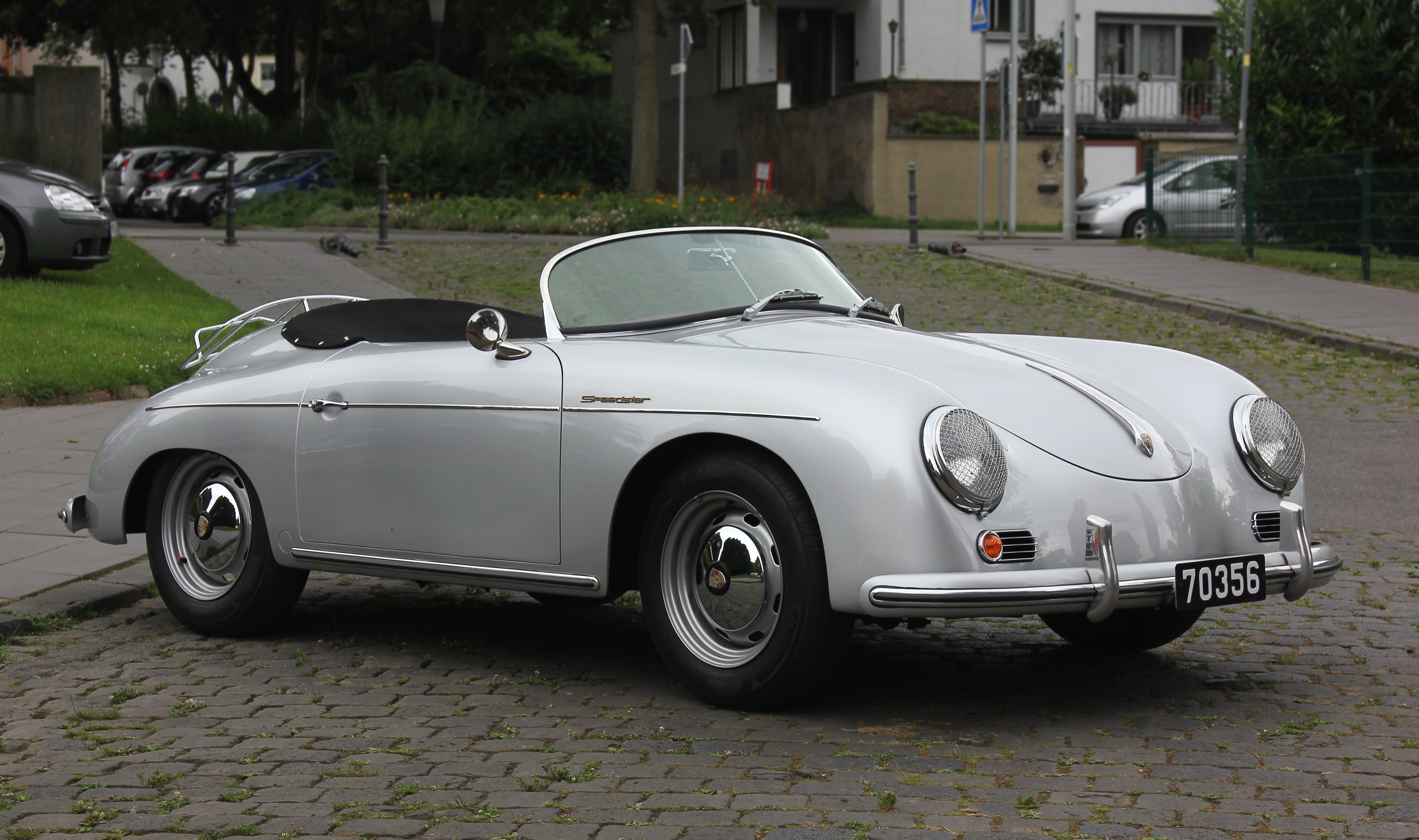 Porsche 356 A 1600 Super Speedster, Baujahr 1956, 1582 cm³, 75 PS bei 5000/min; Nardi-Lenkrad nachgerüstet